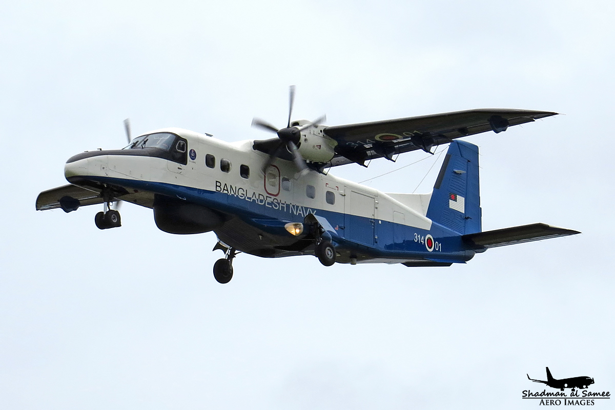 VGEG/CGP 2016